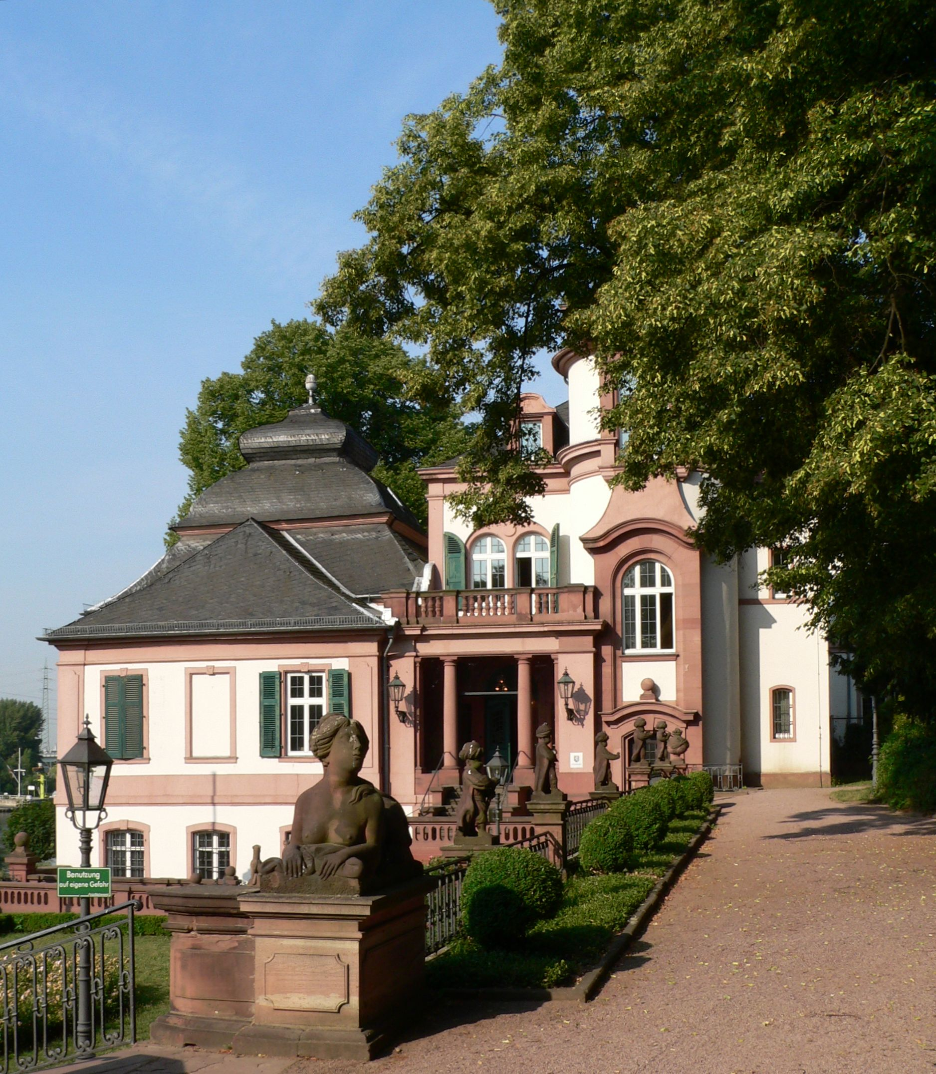 Östlicher Seitenflügel des Bolongaropalastes (heute Standesamt Frankfurt-Höchst)